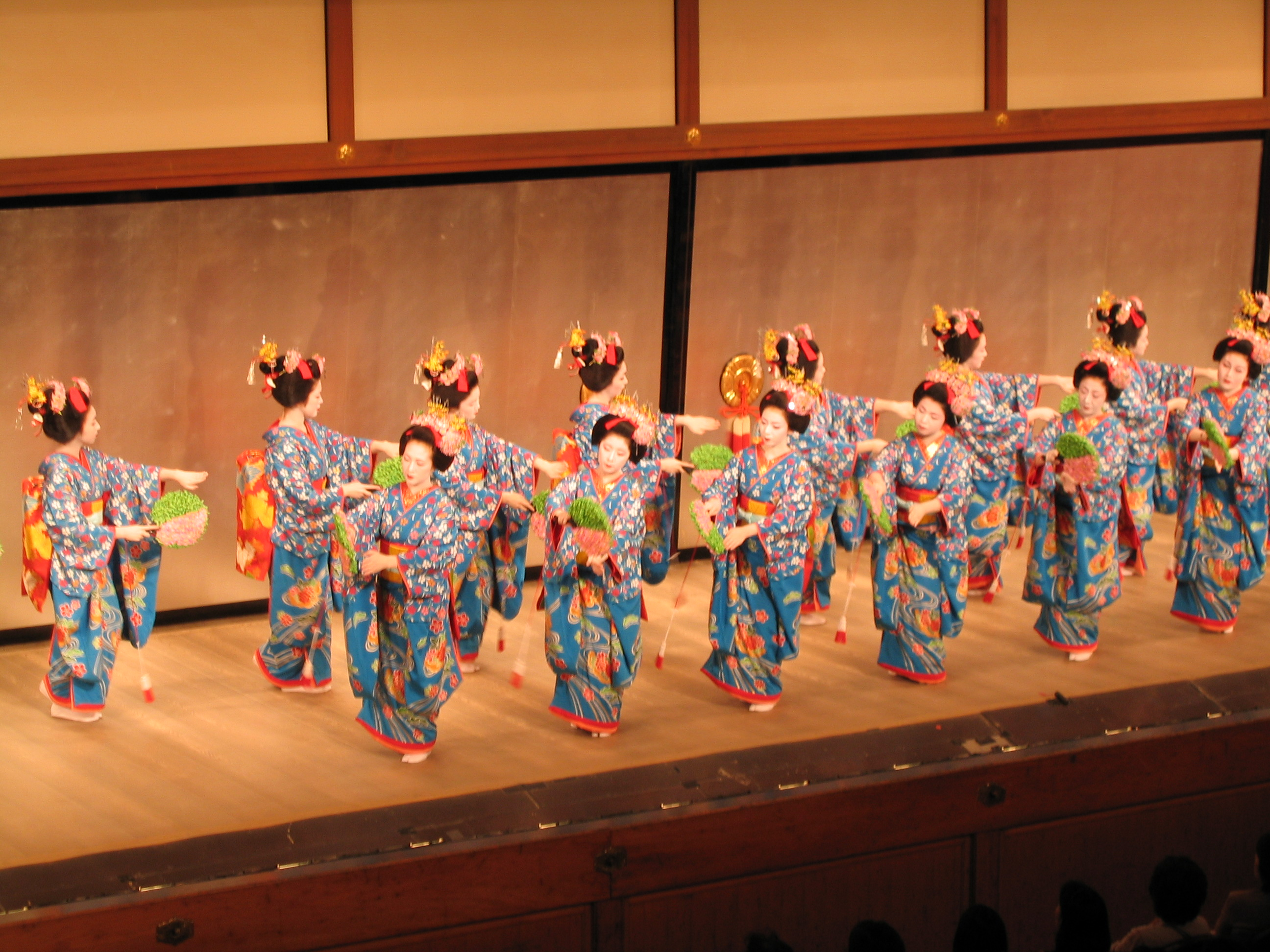 Miyako Odori（都をどり）- Geisha - Kyoto